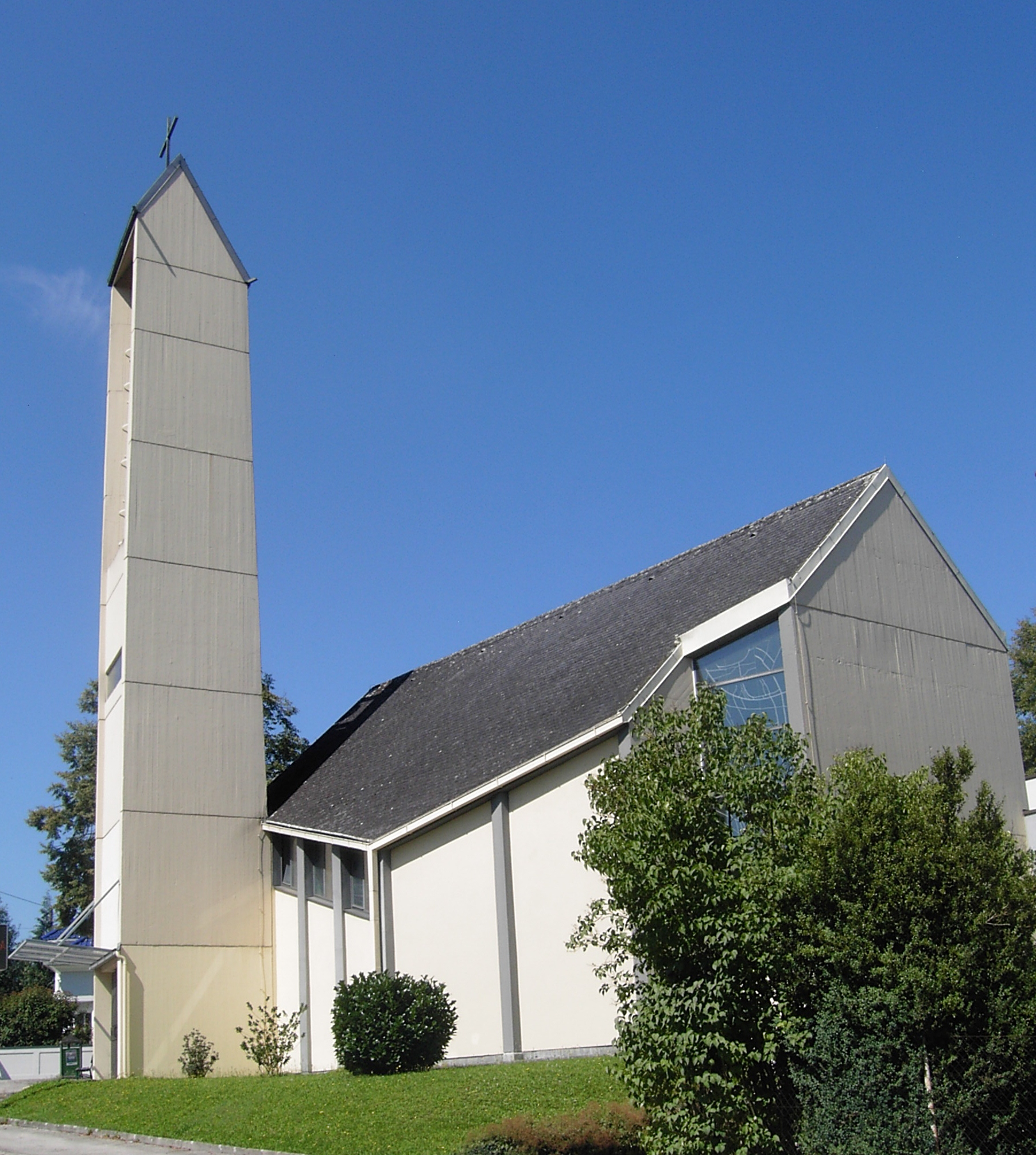 Bad Hall Evangelische Pfarrkirche Römerstraße, Ansicht von Römerstraße